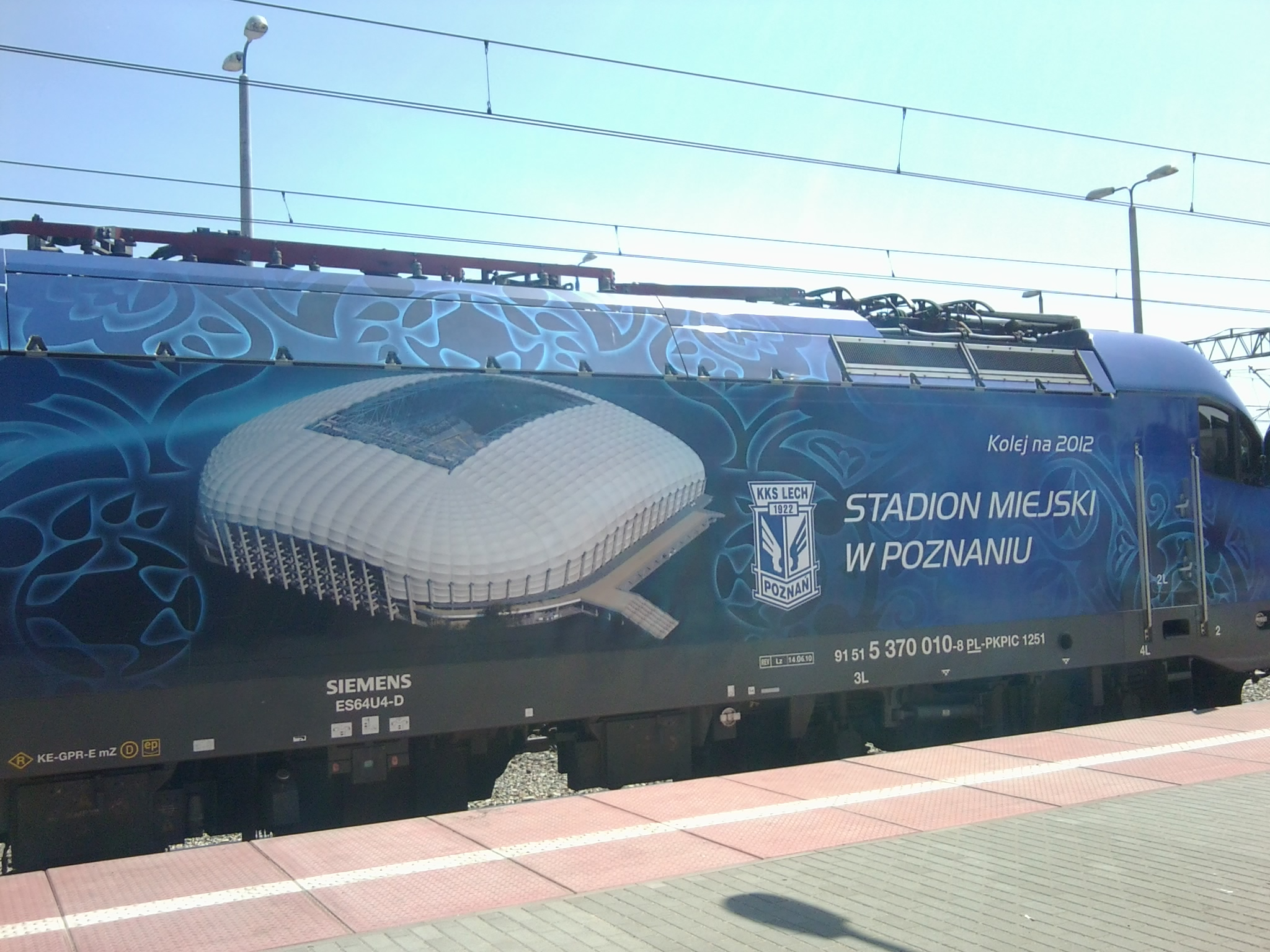 Jedna z polskich aren na których będą rozgrywane mecze EURO 2012, tu Stadion Miejski w Poznaniu.